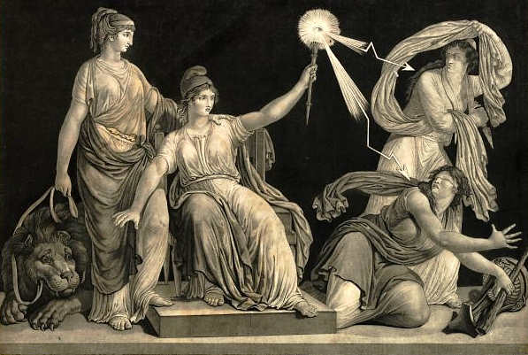 La Liberté armée du sceptre de la Raison foudroie l’ignorance et le Fanatisme. Gravure allégorique de Louis Boizot et Jean-Baptiste Chapuy (entre 1793 et 1795).